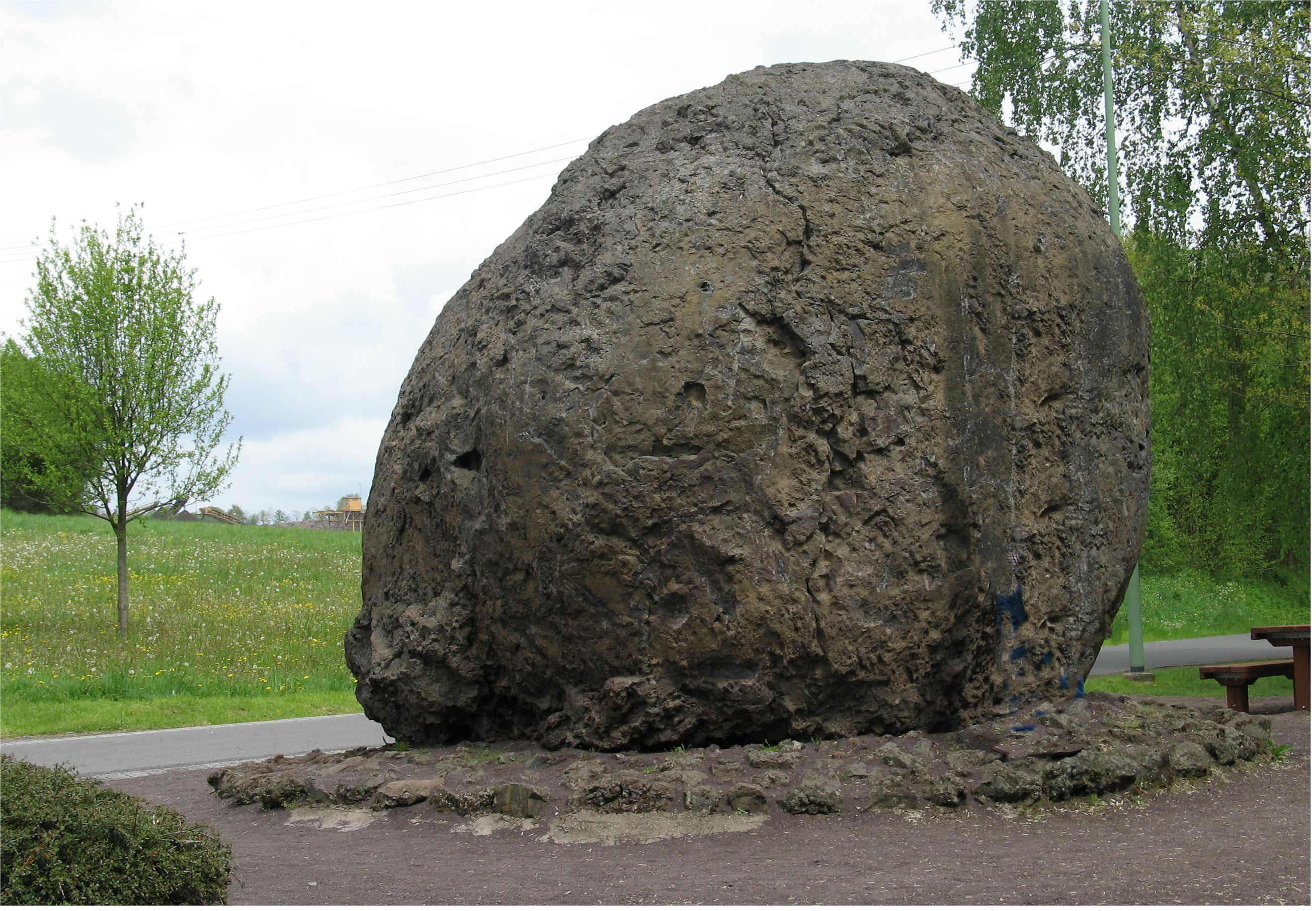 D'Lavabomm vu Strohn (Vulkaneifel)